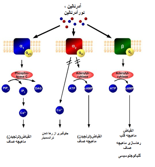 دسته بندی گیرنده های آدرنرژیک، سیگنال ترانسداکشن و اثرات آنها